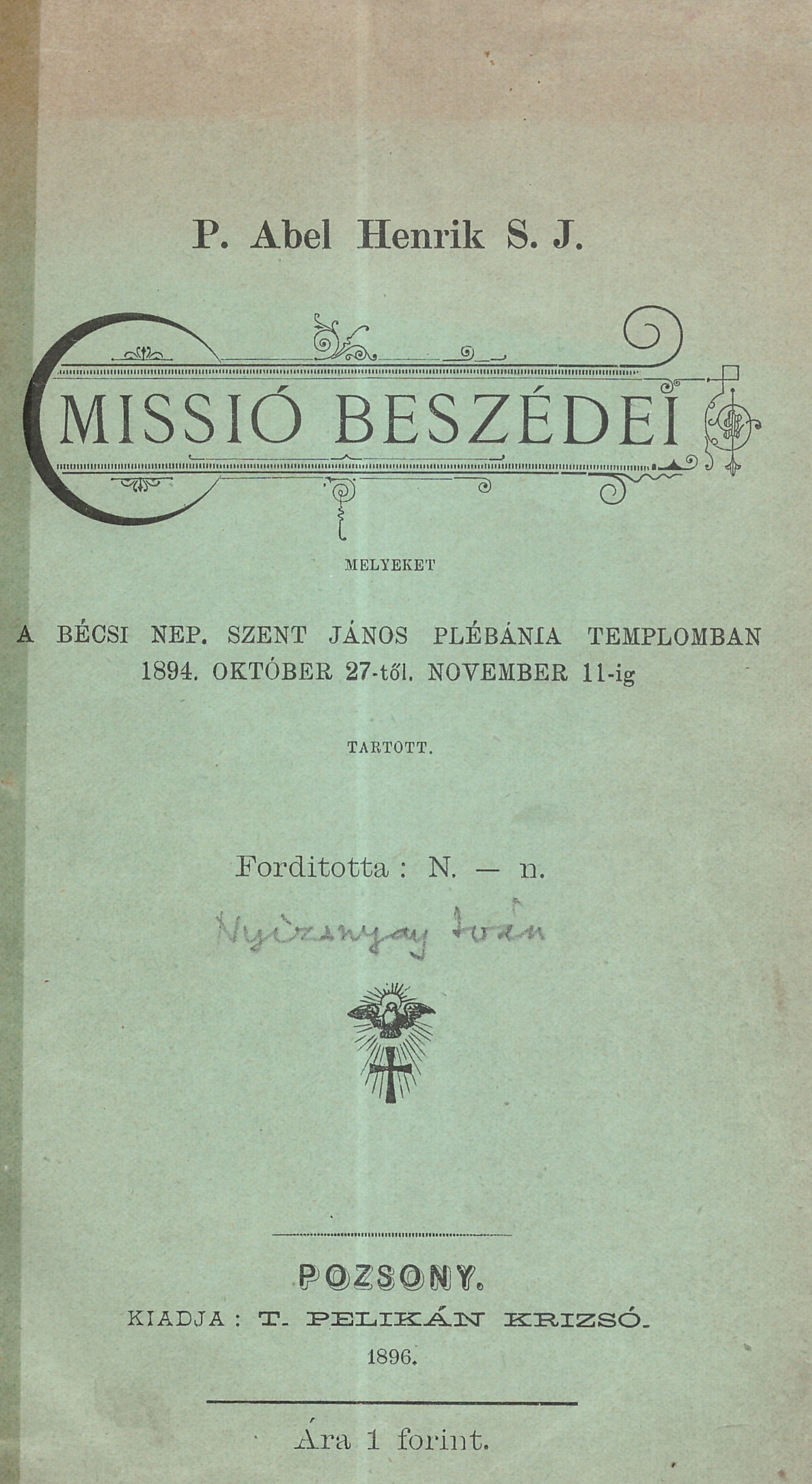 Heinrich Abel (1843-1926) beszédei, 1896-os kiadás